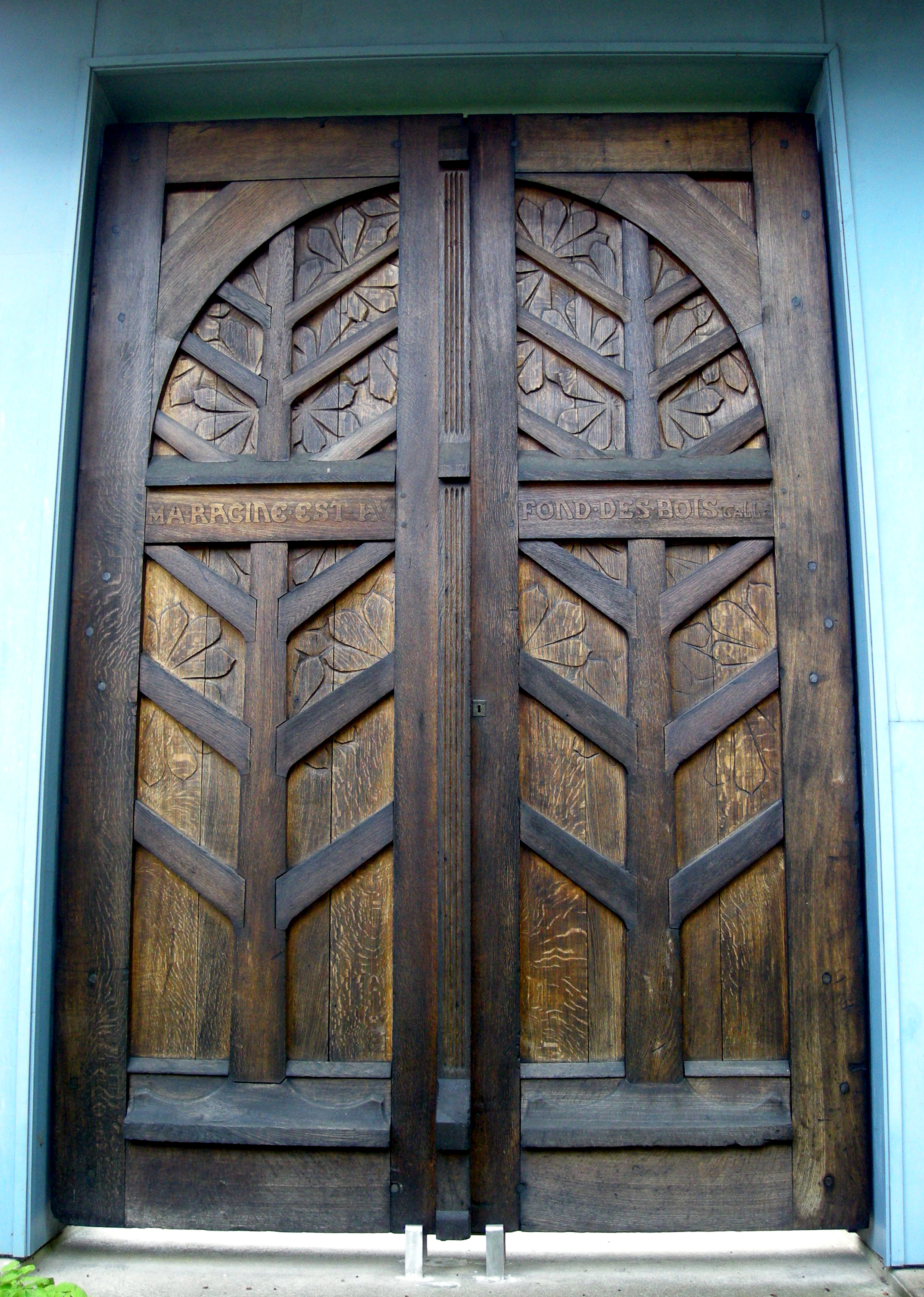 Devise d'Emile Gallé : "Ma racine est au fond des bois", gravée par l'ébéniste Eugène Vallin sur une porte en bois exécutée en 1897 pour les ateliers Gallé et installée en 1964 dans les jardins du Musée de l'École de Nancy. Décor stylisé de feuilles de marronier. Quatre influences principales : art médiéval, japonisme, naturalisme et rationalisme (Source : signalétique du Musée)